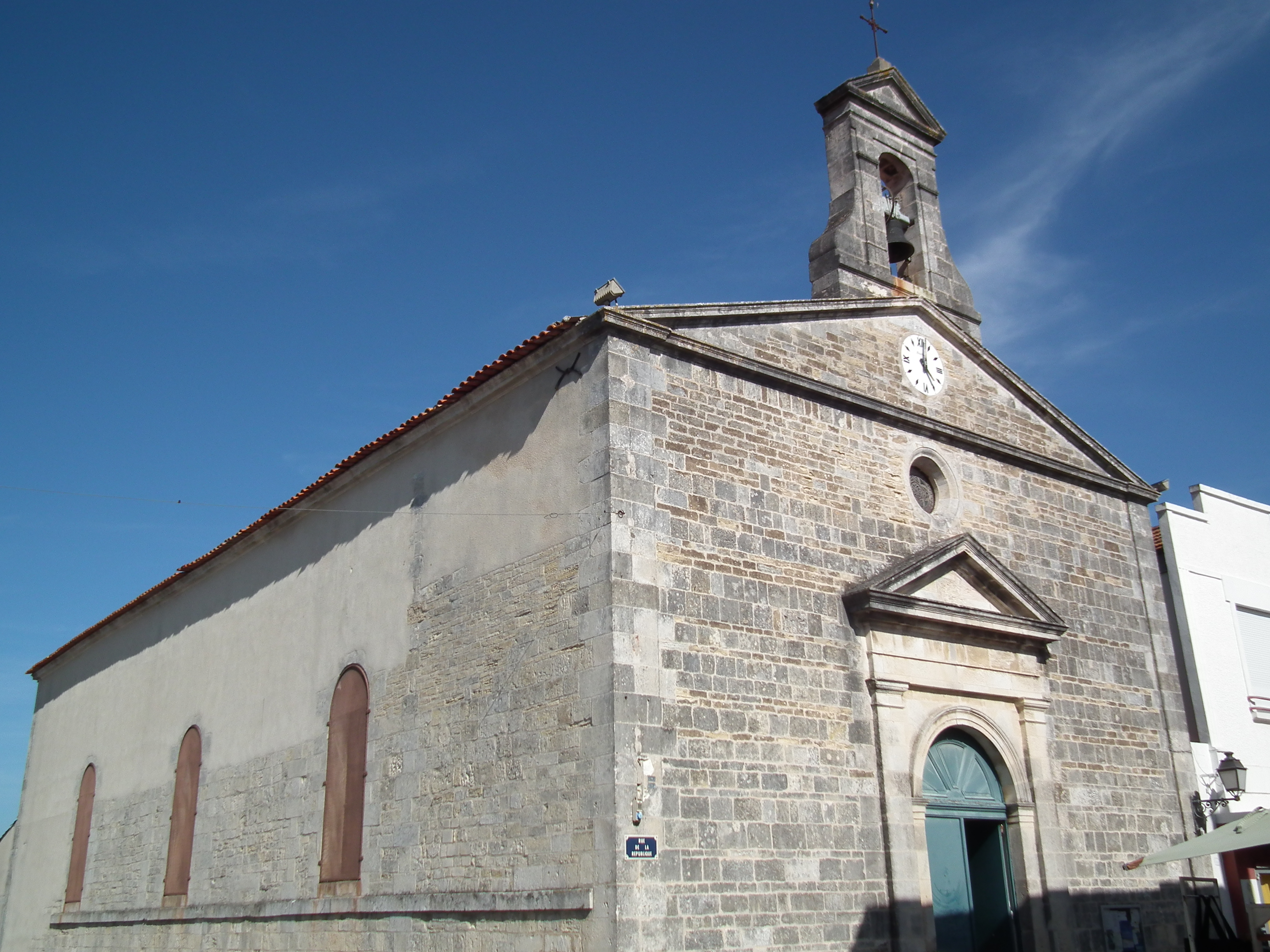 L'église de Saint-Trojan